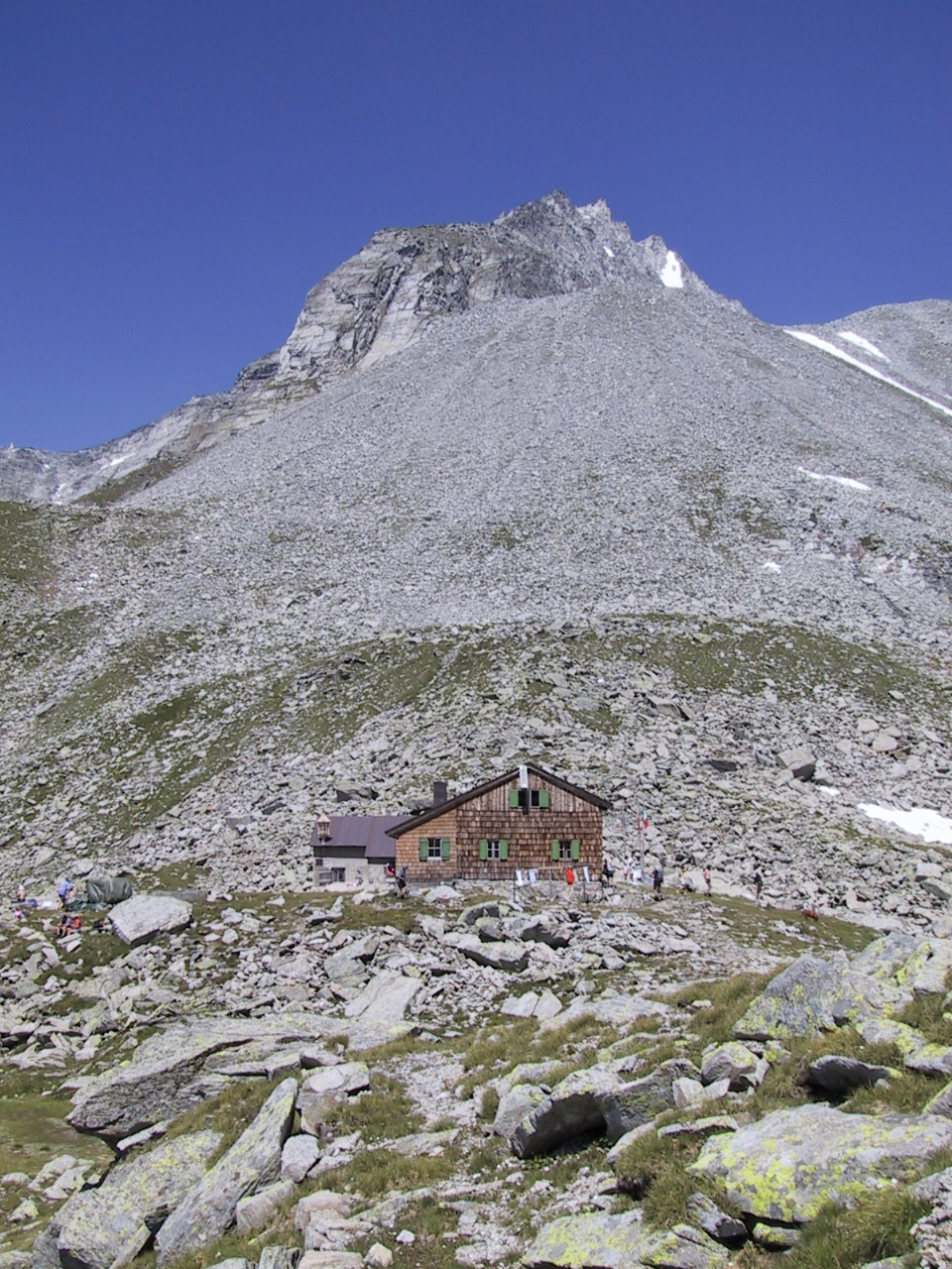 Edelrauthütte auf dem Eisbruggjoch in Pfunders mit Blick auf unteren Weißzint